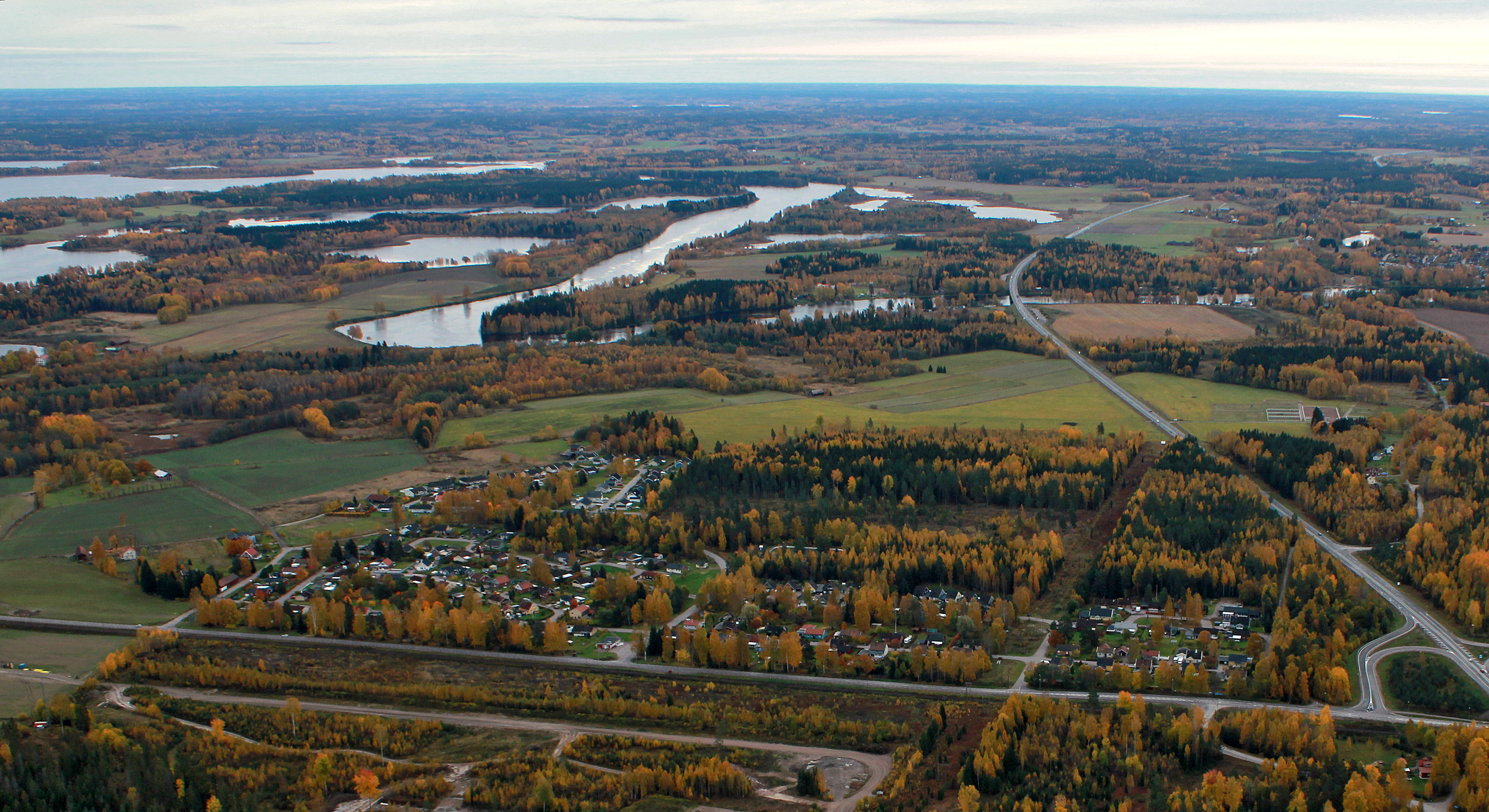 Nordanö, Avesta kommun, i förgrunden. Dalälven i bakgrunden. Riksväg 70 snett vertikalt i bild, till höger. Riksväg 68 horisontellt, i nederkant.